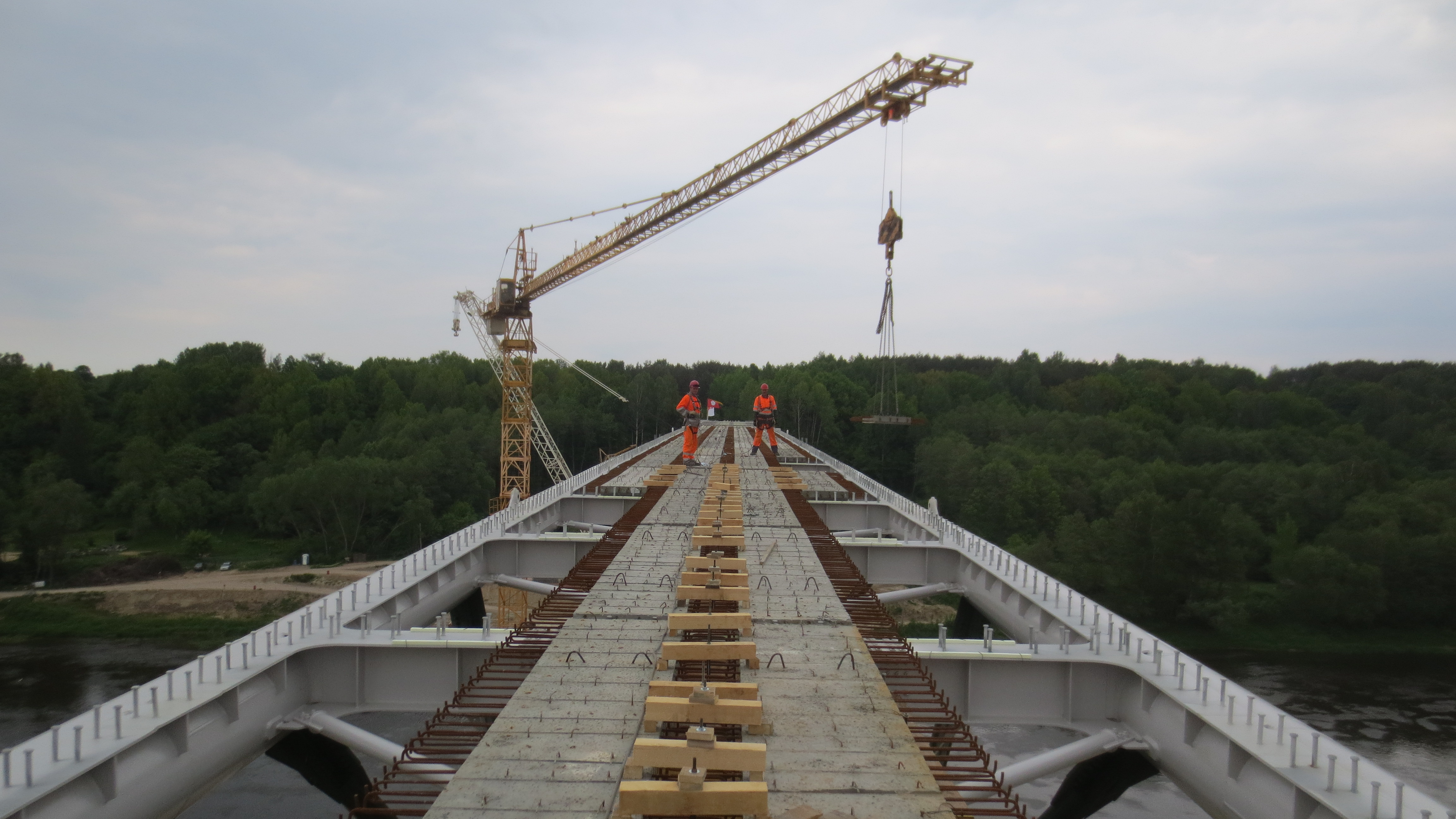 Perdangos pakloto gelžbetoninių plokščių montavimas